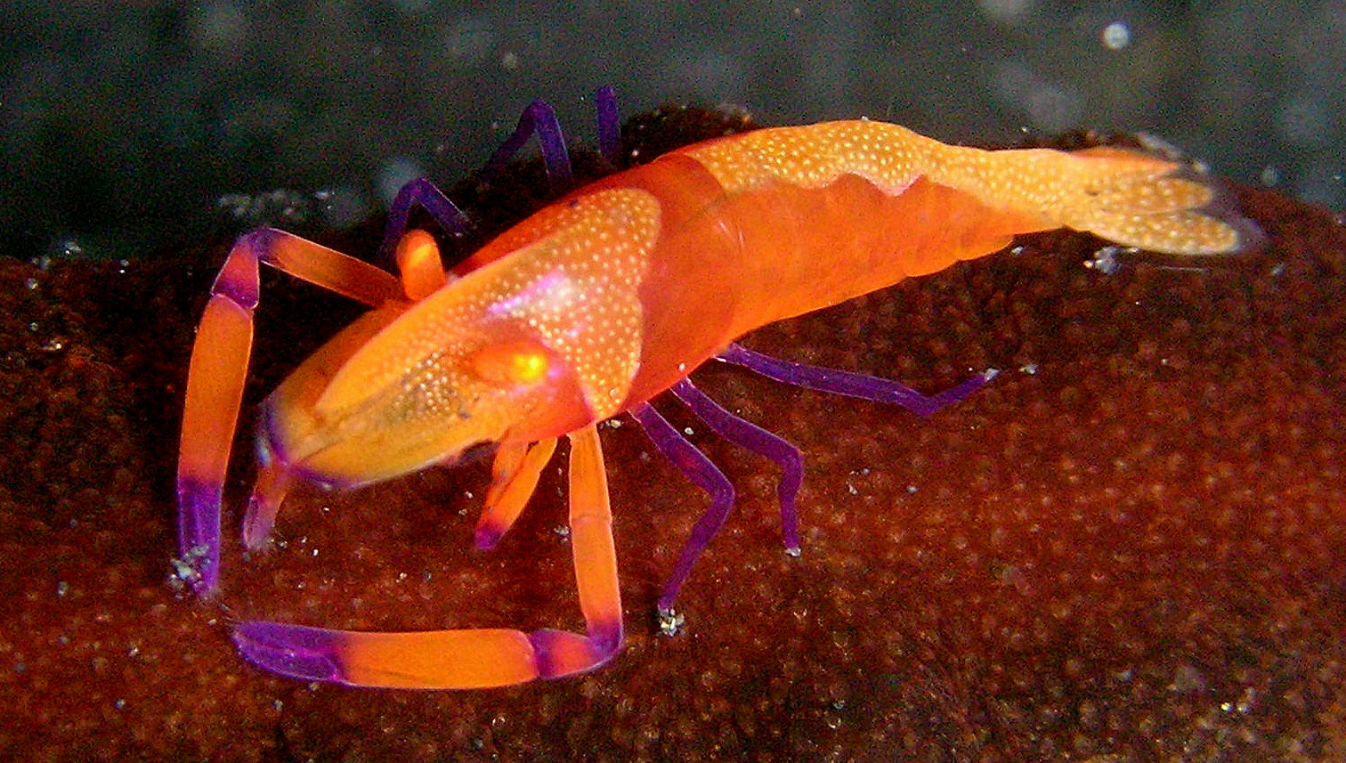 Emperor Shrimp (Periclimenes imperator)